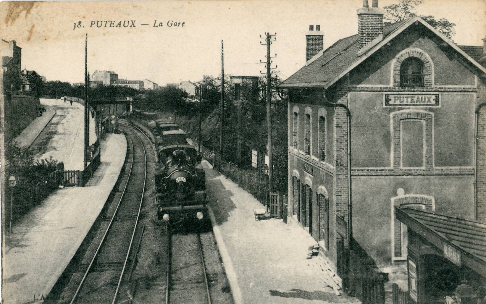 Carte postale ancienne éditée par Abeille, N° 38w:fr:Puteaux : La Gare